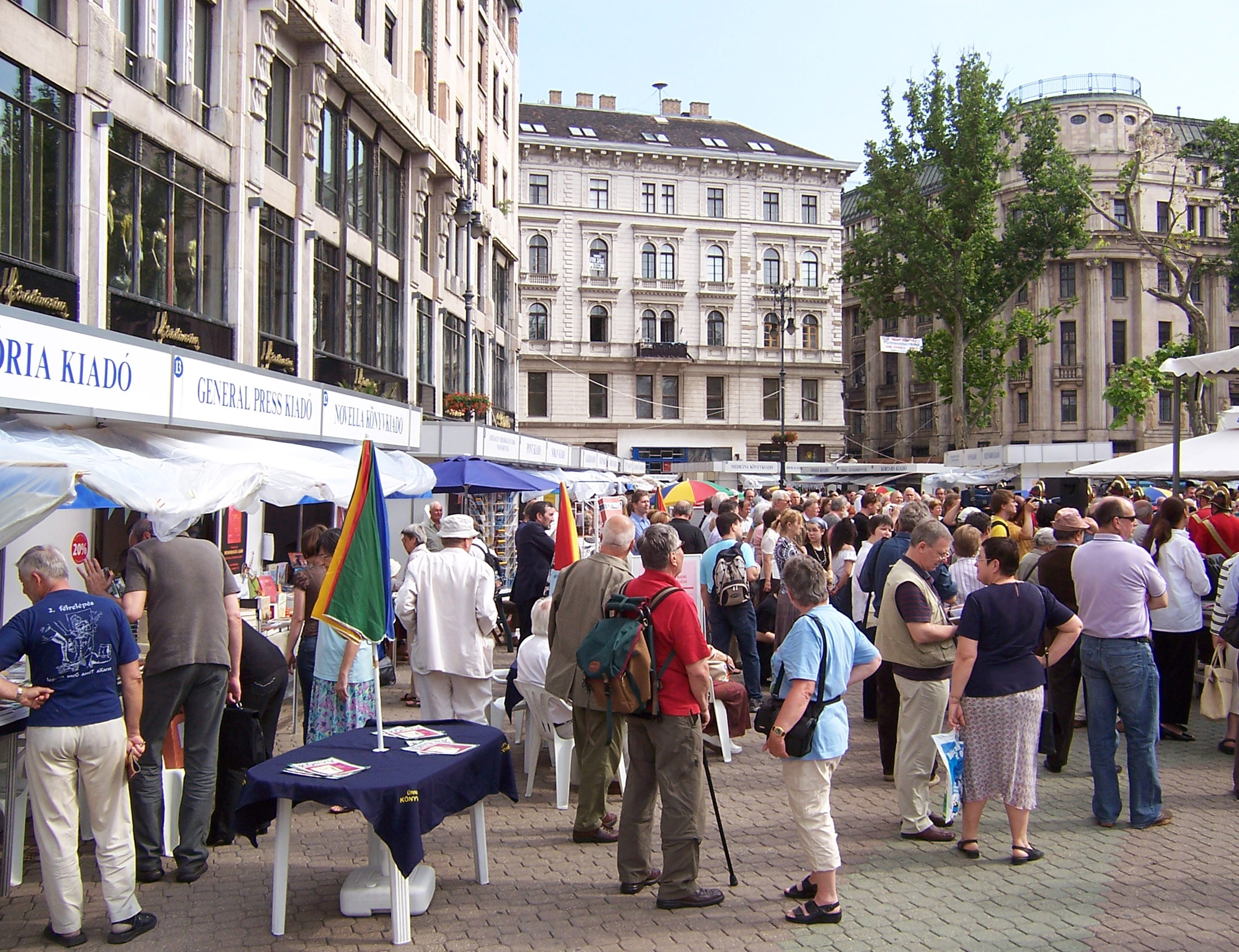 Fête du Livre á Budapest (Hongrie, Hungary)